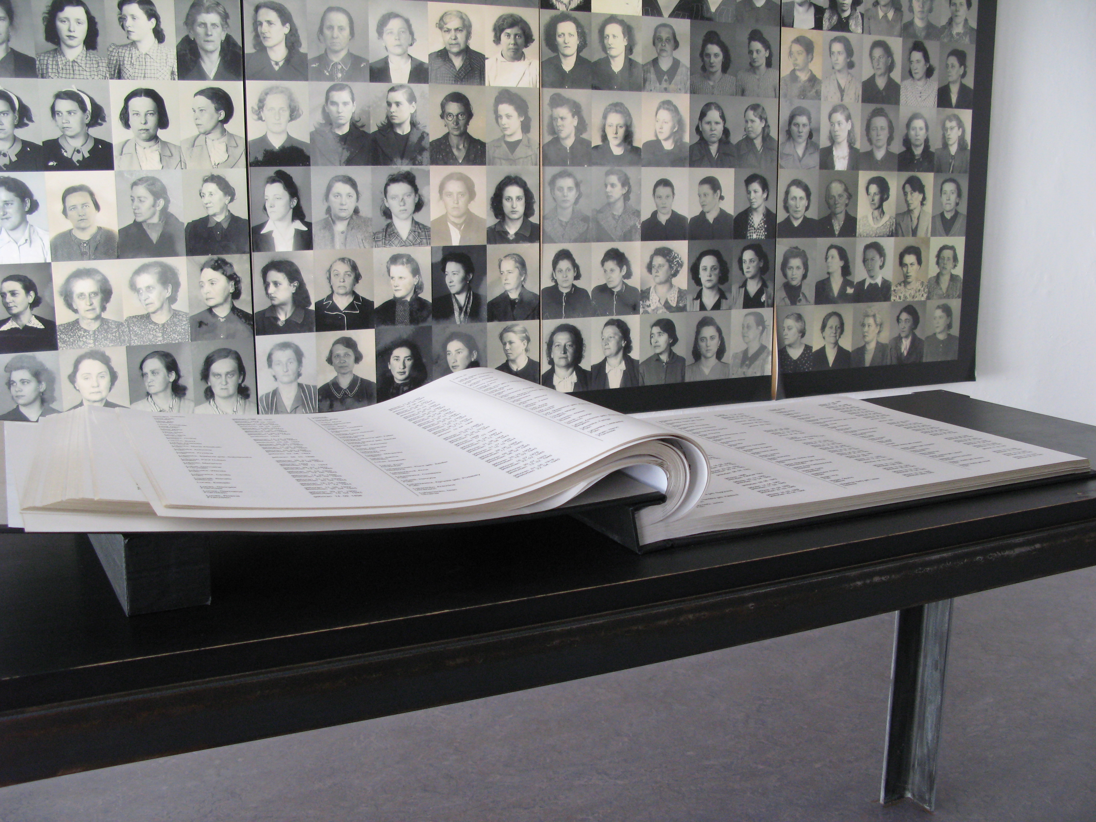 Ausstellungsraum in der Mahn- und Gedenkstätte Ravensbrück im ehemaligen KZ Ravensbrück.